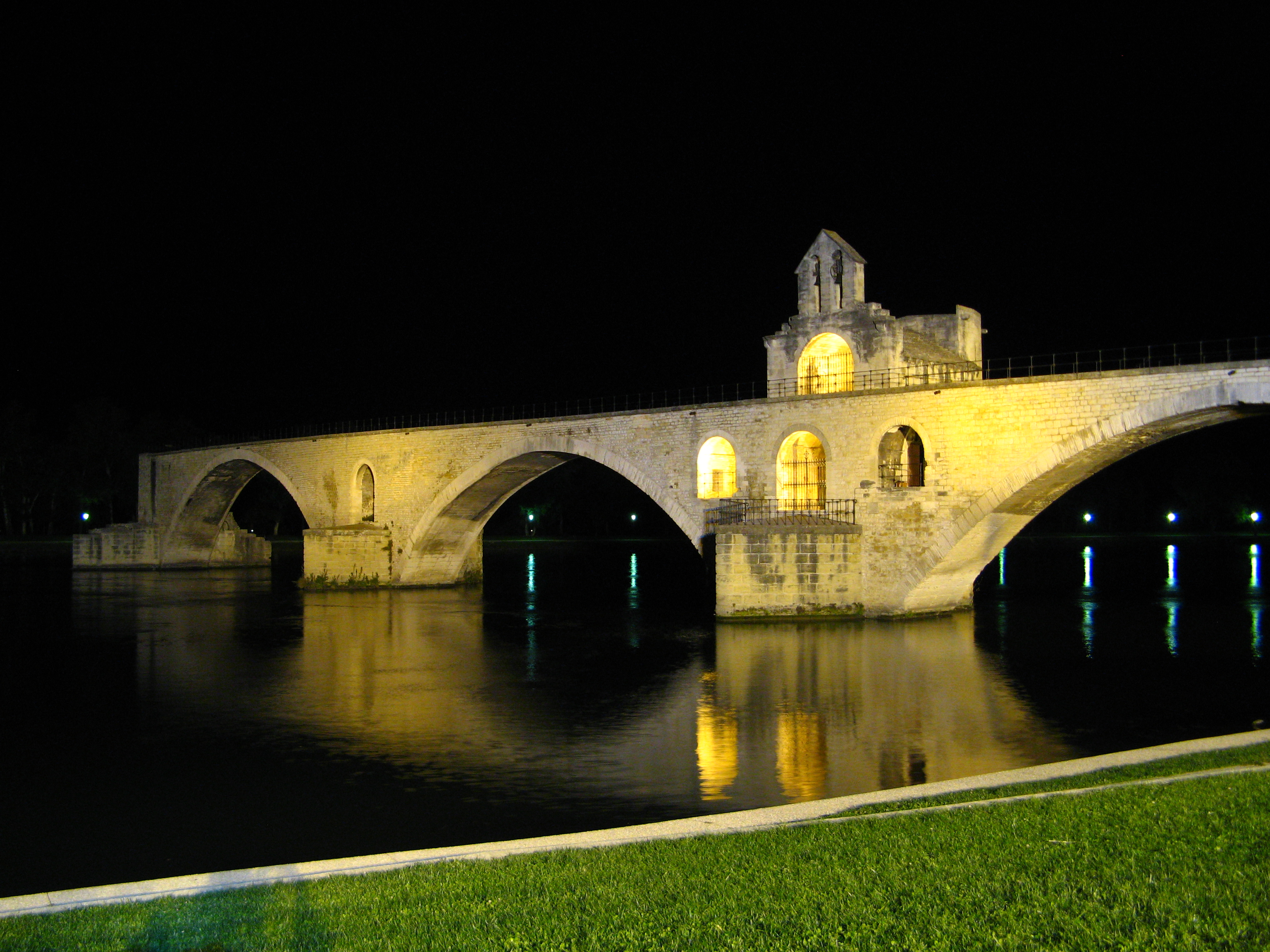 Pont Saint-Bénézet, à Avignon (Vaucluse), illuminé la nuit